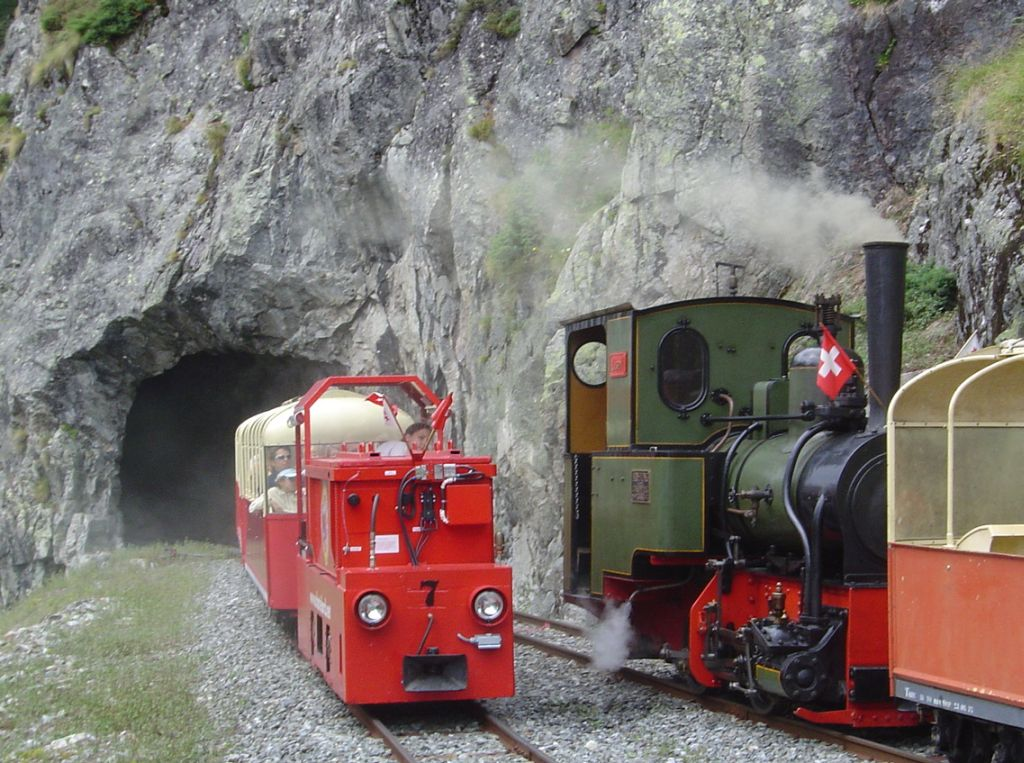 Jung Lok No 1693/1911 "Liseli" im "Parc d'Attractions du Châtelard". Zugskreuzung auf der Panoramabahn mit Akku-Lok Nr. 7 am 26.07.2005. Bild: Thomas Brändle, Schweiz